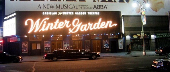 Winter Garden Theatre, Broadway, New York : théâtre de la création de West Side Story